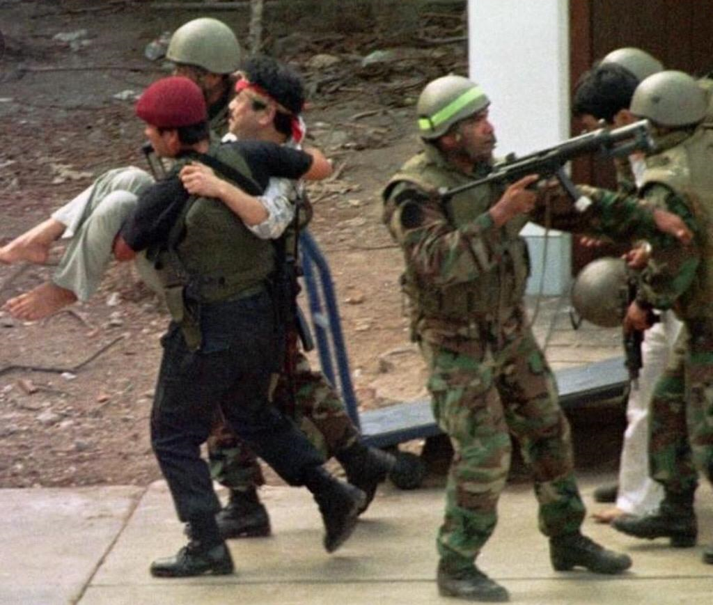 César Astudillo RESCATE DE REHENES CHAVÍN DE HUÁNTAR